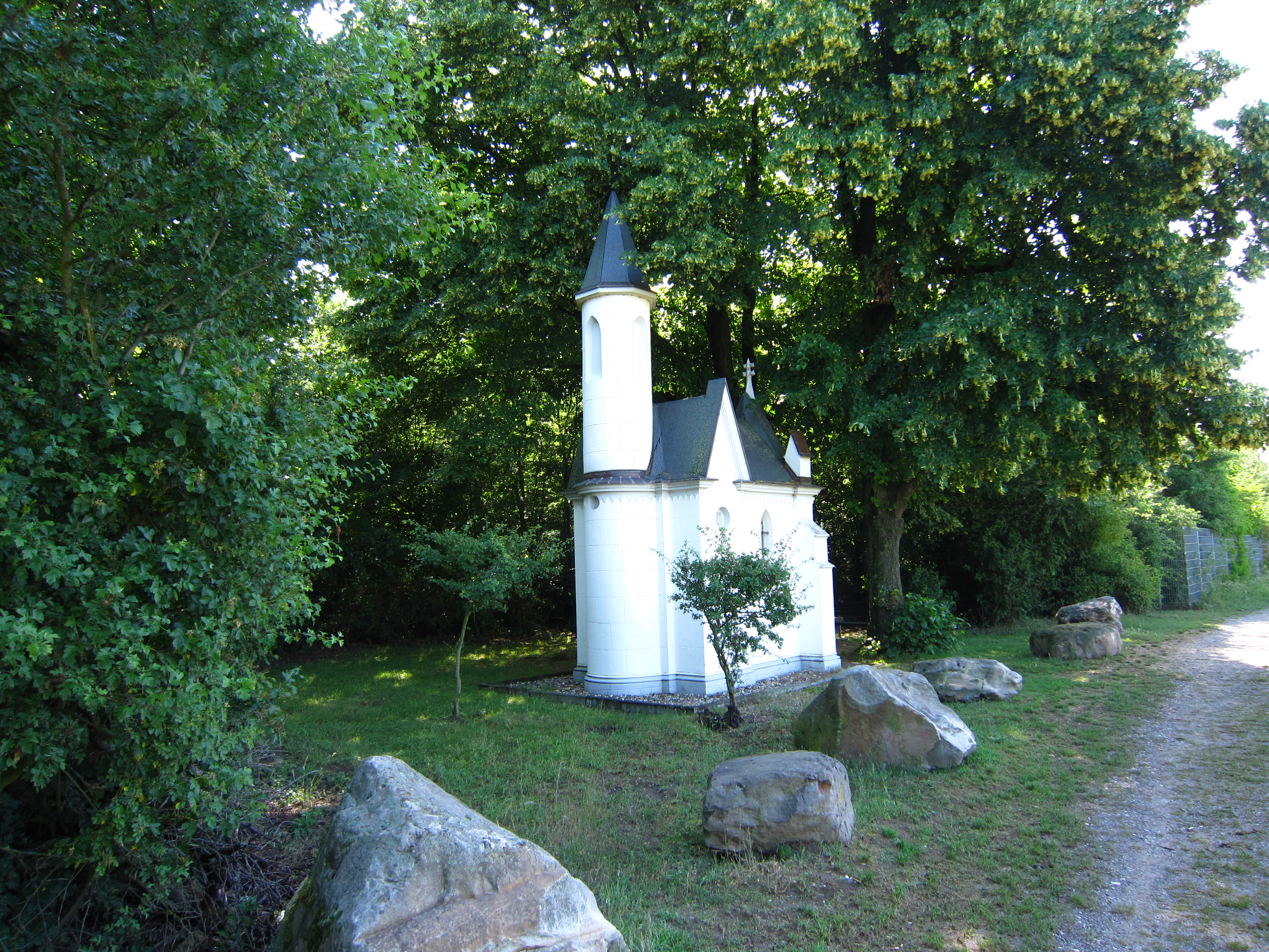 Immakulata Kapelle in Troisdorf